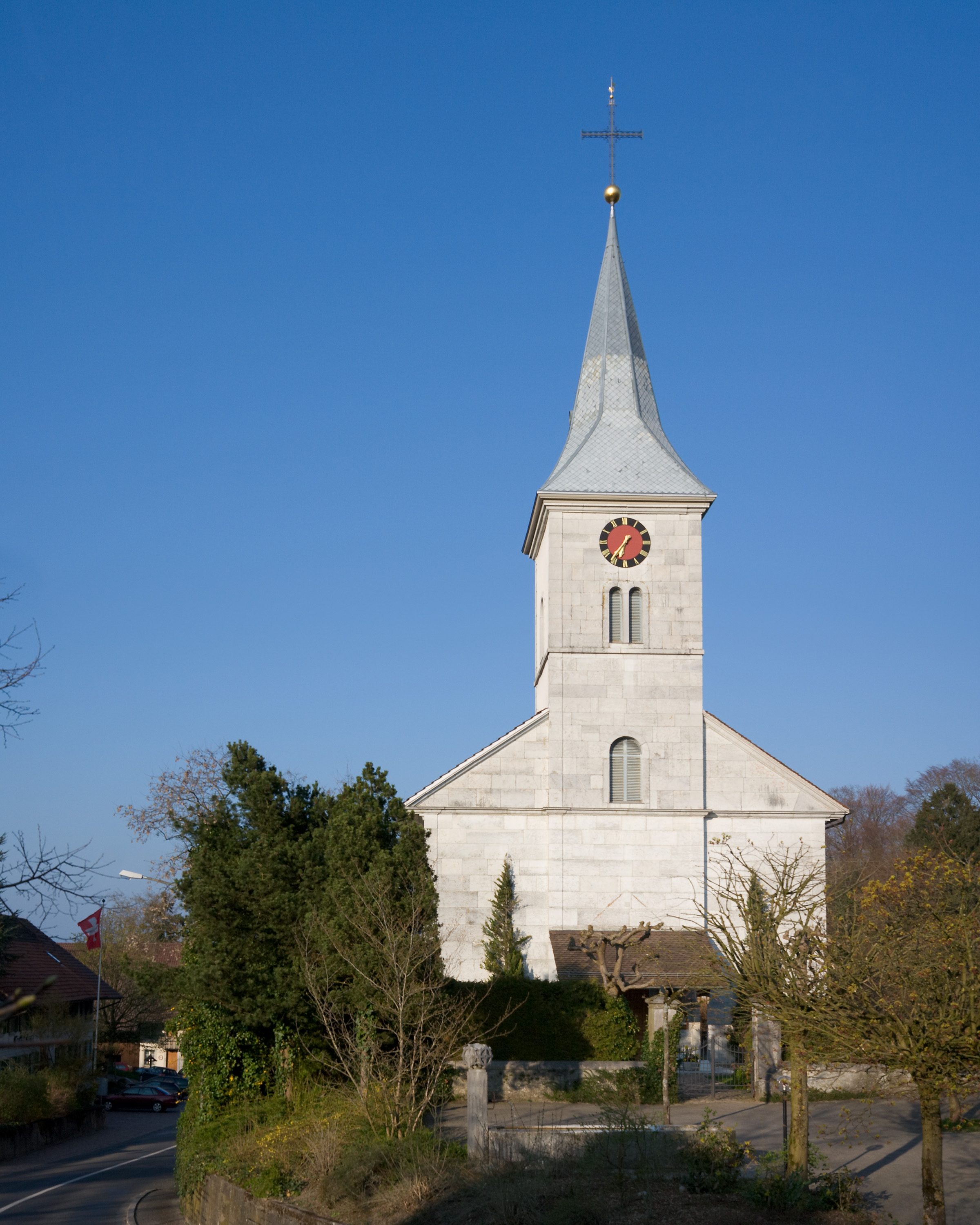 Kirche Mühledorf, Kanton Solothurn, Schweiz